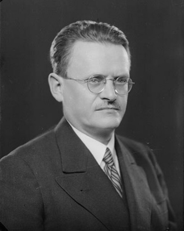 Zdeněk Bažant (inv. číslo negativu K13-ADA055-03)